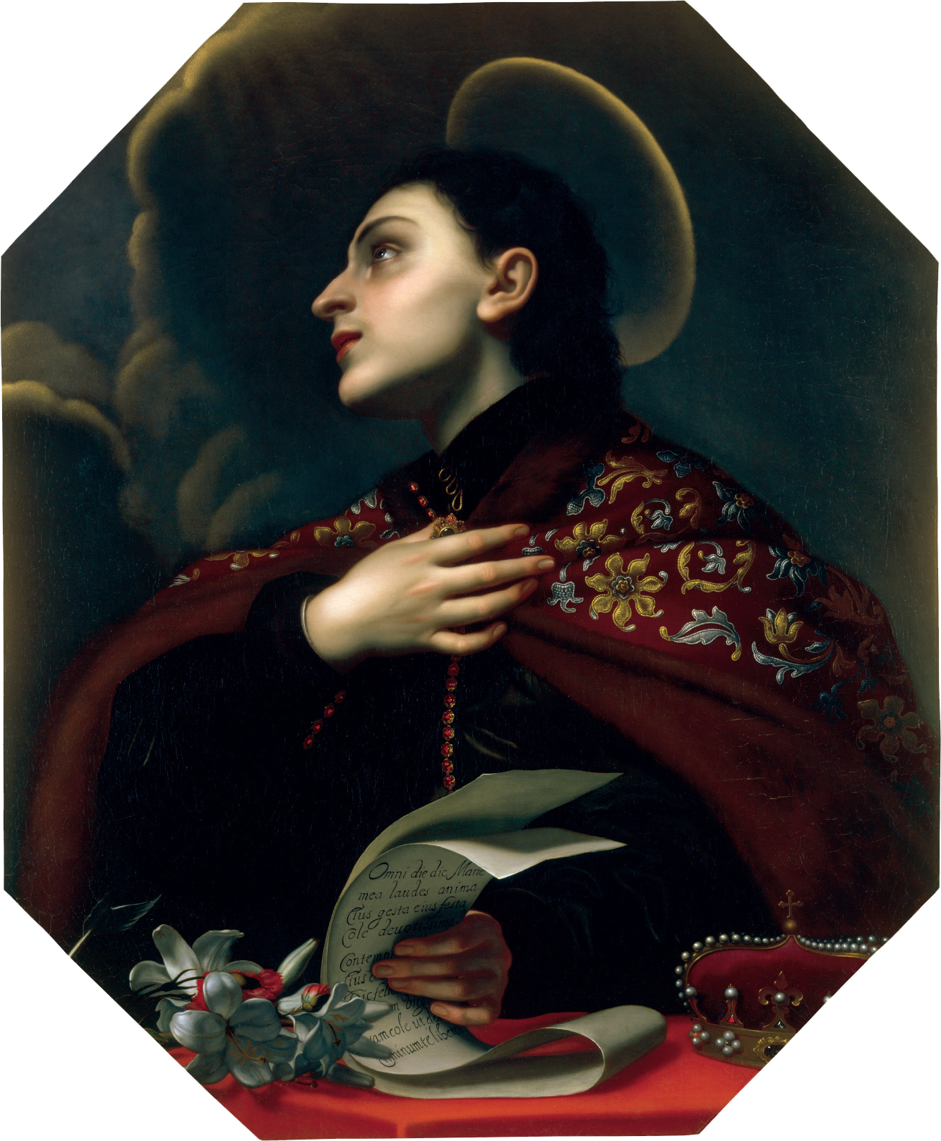 Святы Казімір. Абраз Караля Дольчы. 2-я пал. XVII ст. Дзяржаўны музей выяўленчага мастацтва імя А. С. Пушкіна. МаскваБеларуская (тарашкевіца): Сьвяты Казімер (Kazimier)